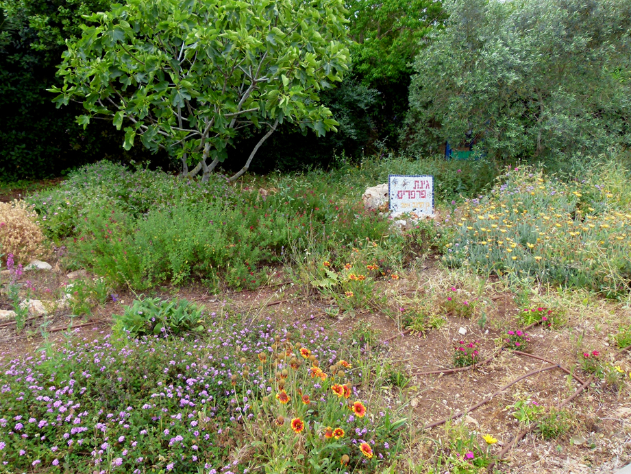 גינת פרפרים ביישוב רקפת בגליל התחתון